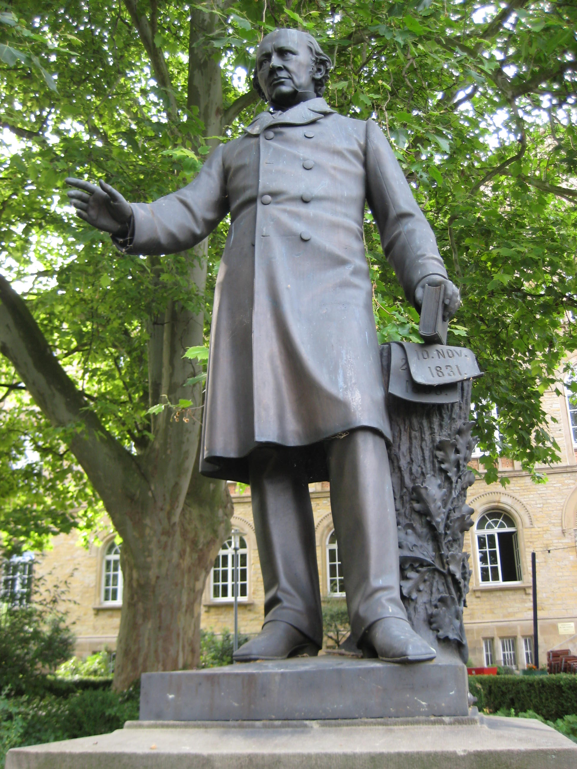 Johann Carl Bertram Stüve von Heinrich Pohlmann in Osnabrück, ursprünglich auf dem Markt, jetzt vor der Volkshochschule